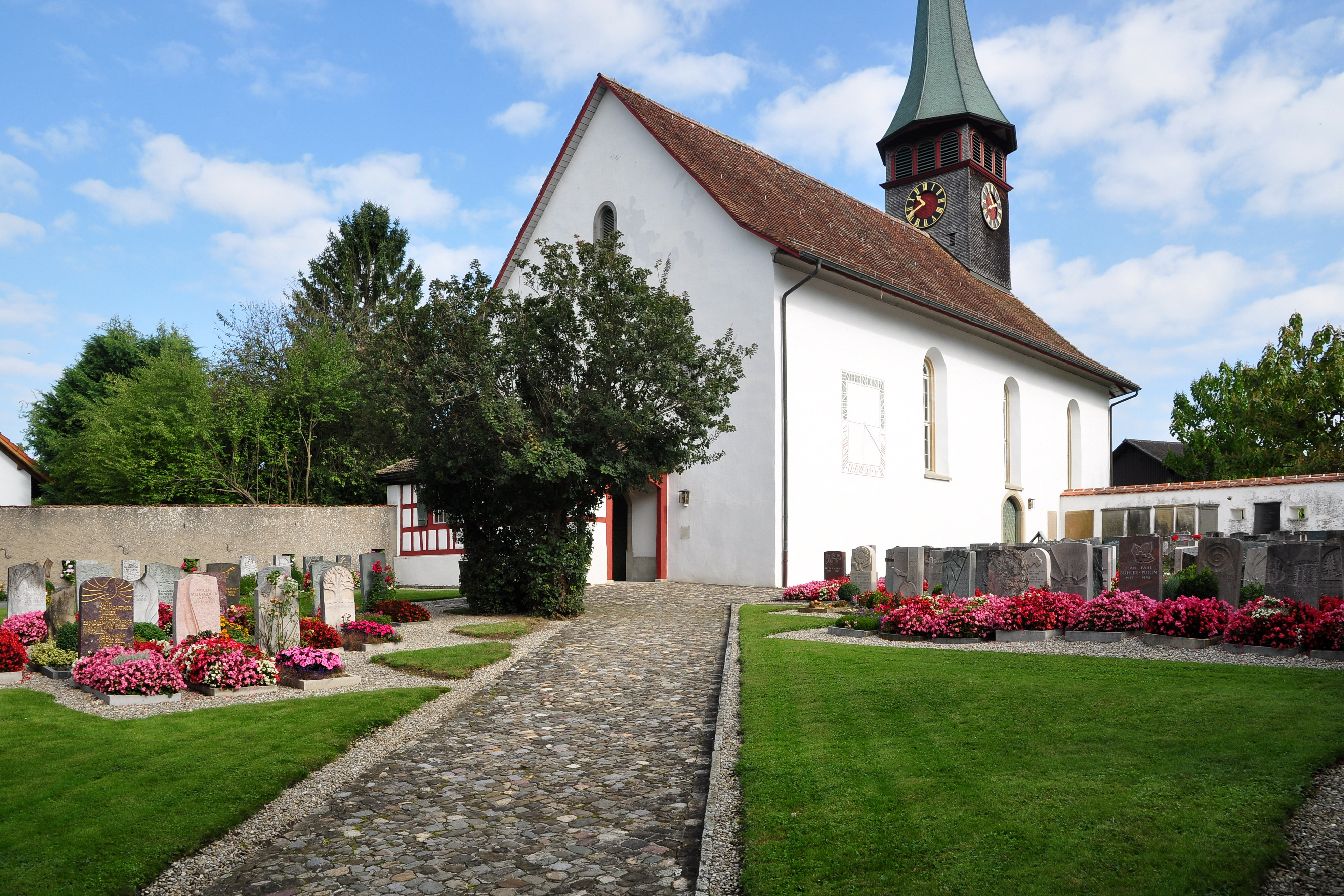 Kirchenbezirk, Büelstrasse 17 in Weiach (Switzerland)